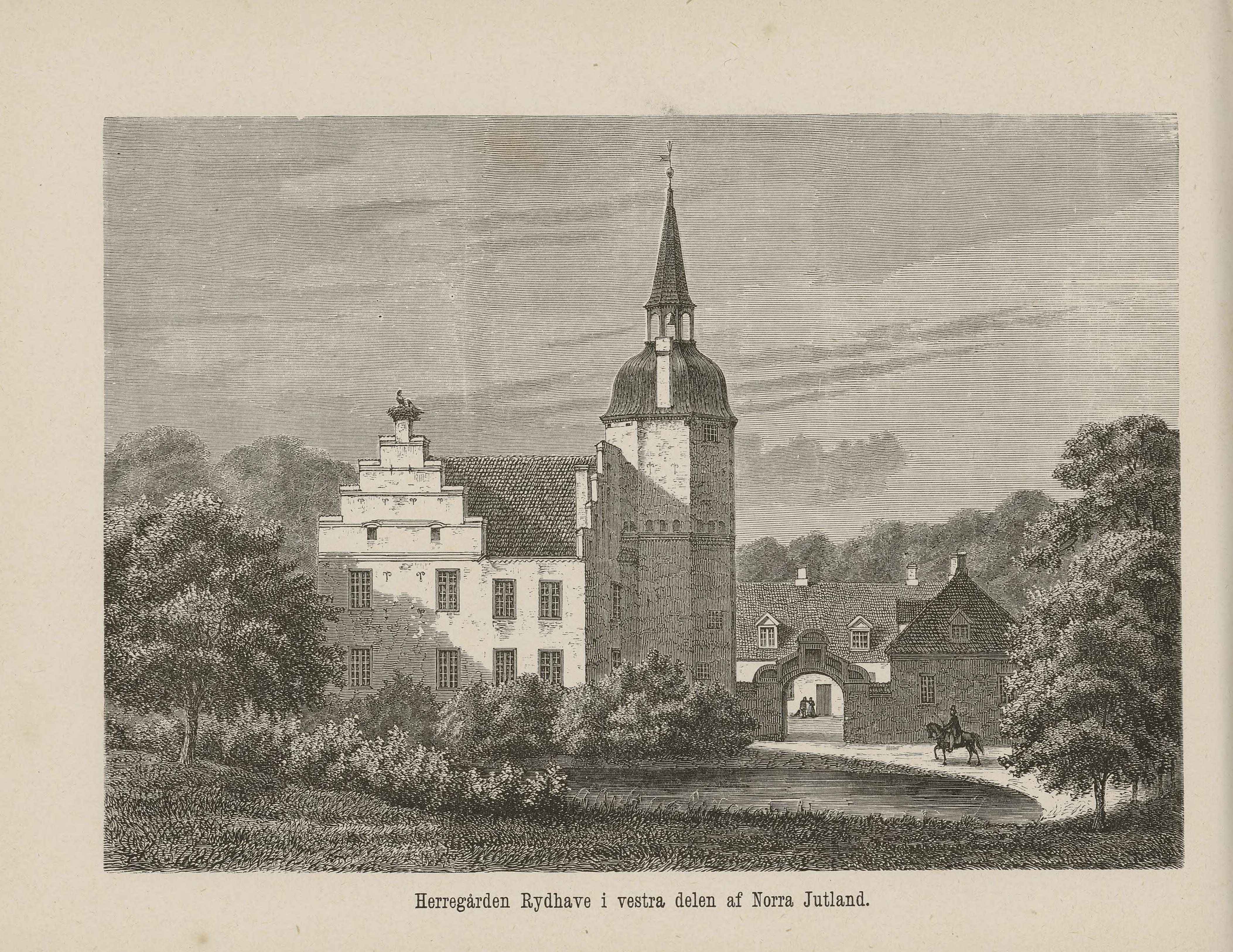 Illustrasjon hentet fra boken Nordiska taflor av ukjent forfatter og utgitt av Albert Bonnier (se, 1865)